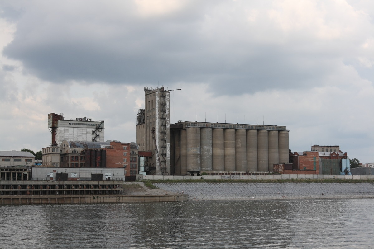 Элеватор в Томске